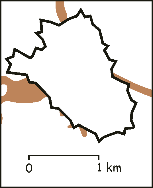 Utilisateur:Laurent Deschodt Summary position approximative de l'enceinte d'Epoque moderne de Lille Catégorie:Cartes et plans de Lille